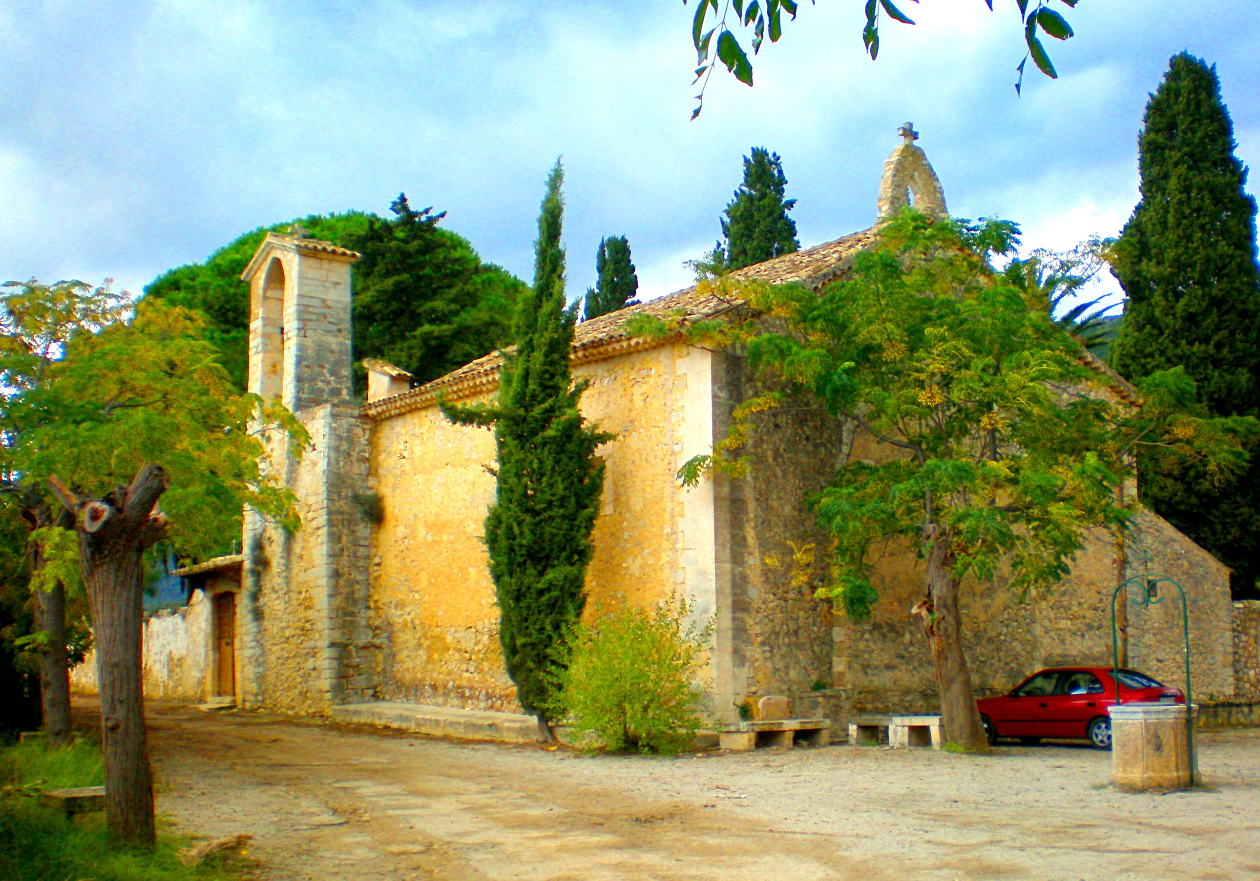 Ermita de Sant Miquel de Campanet (Mallorca, Illes Balears).